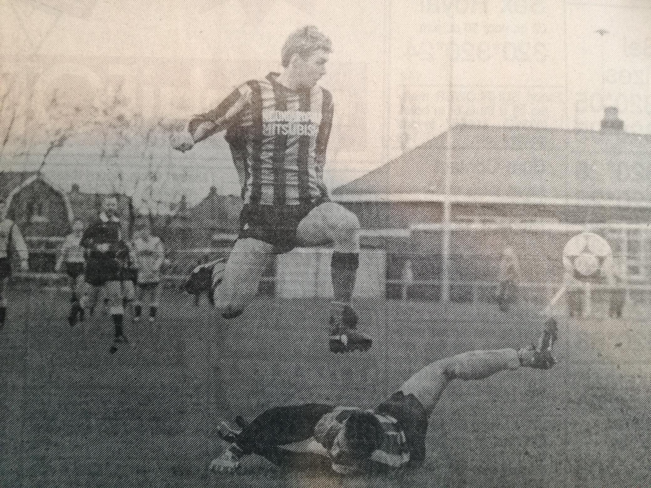 Spits Henk Kok, 350 doelpunten voor JVC